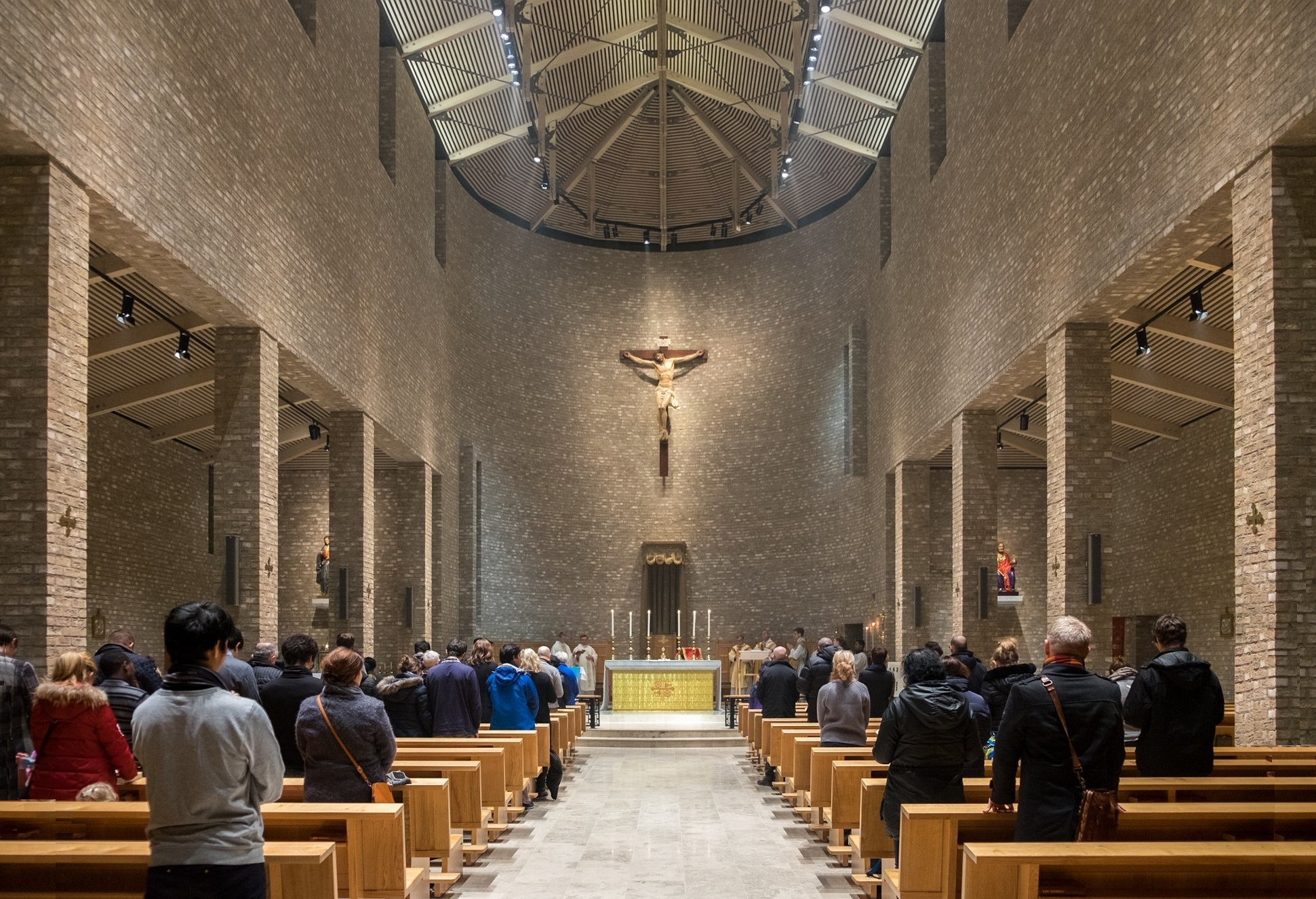 St Olav domkirke Trondheim, hovedskipet sett mot alteret